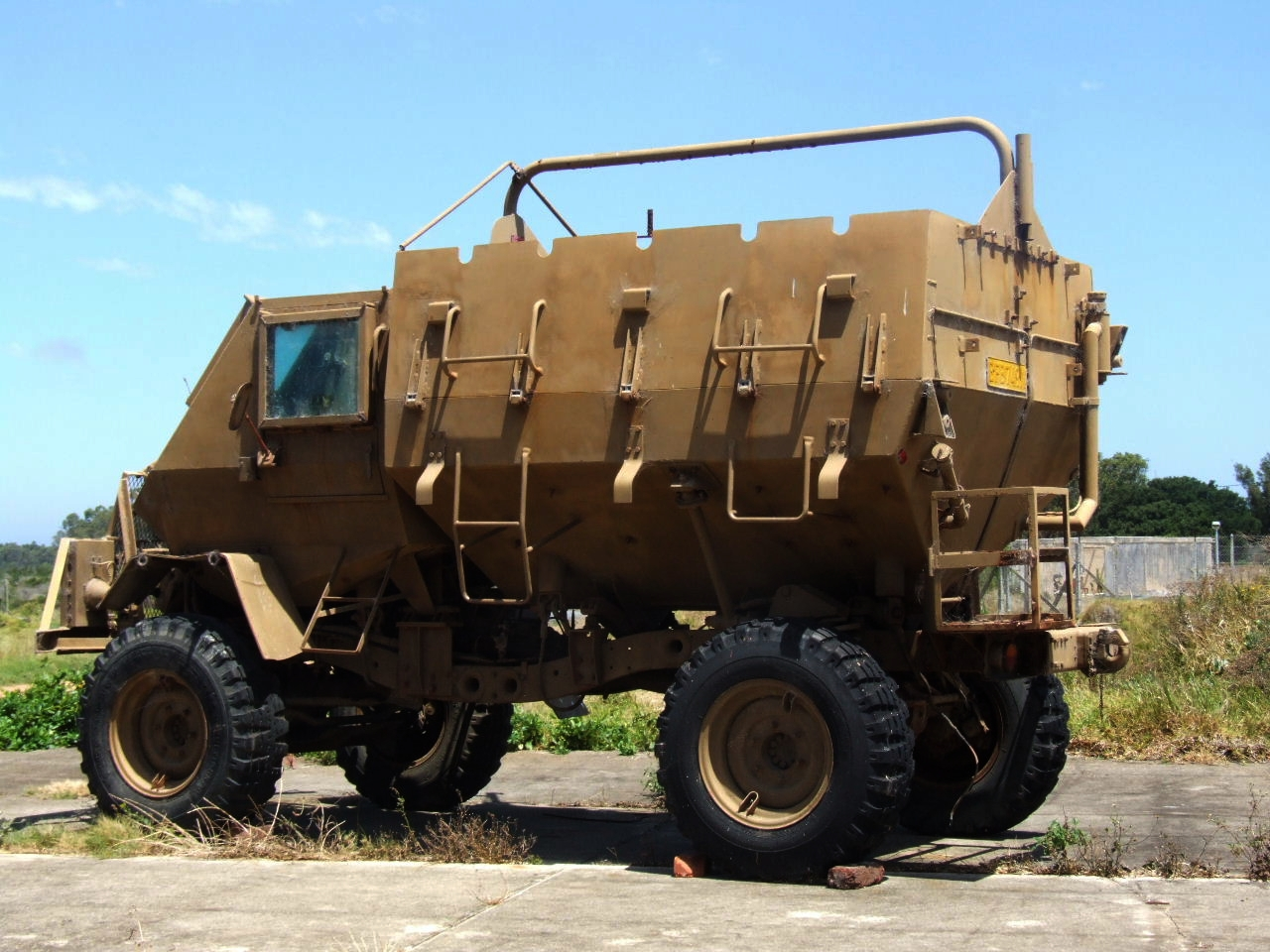 Buffel armoured personnel carrier